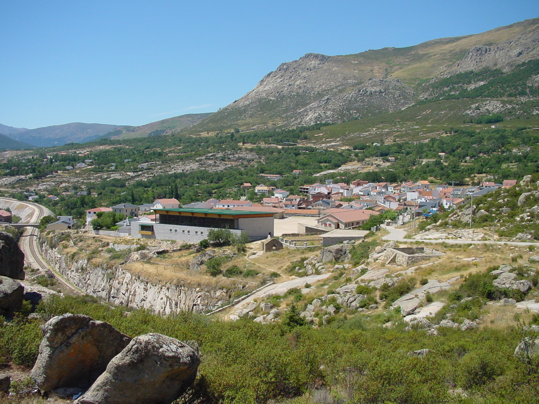 Vista de Valdemanco.